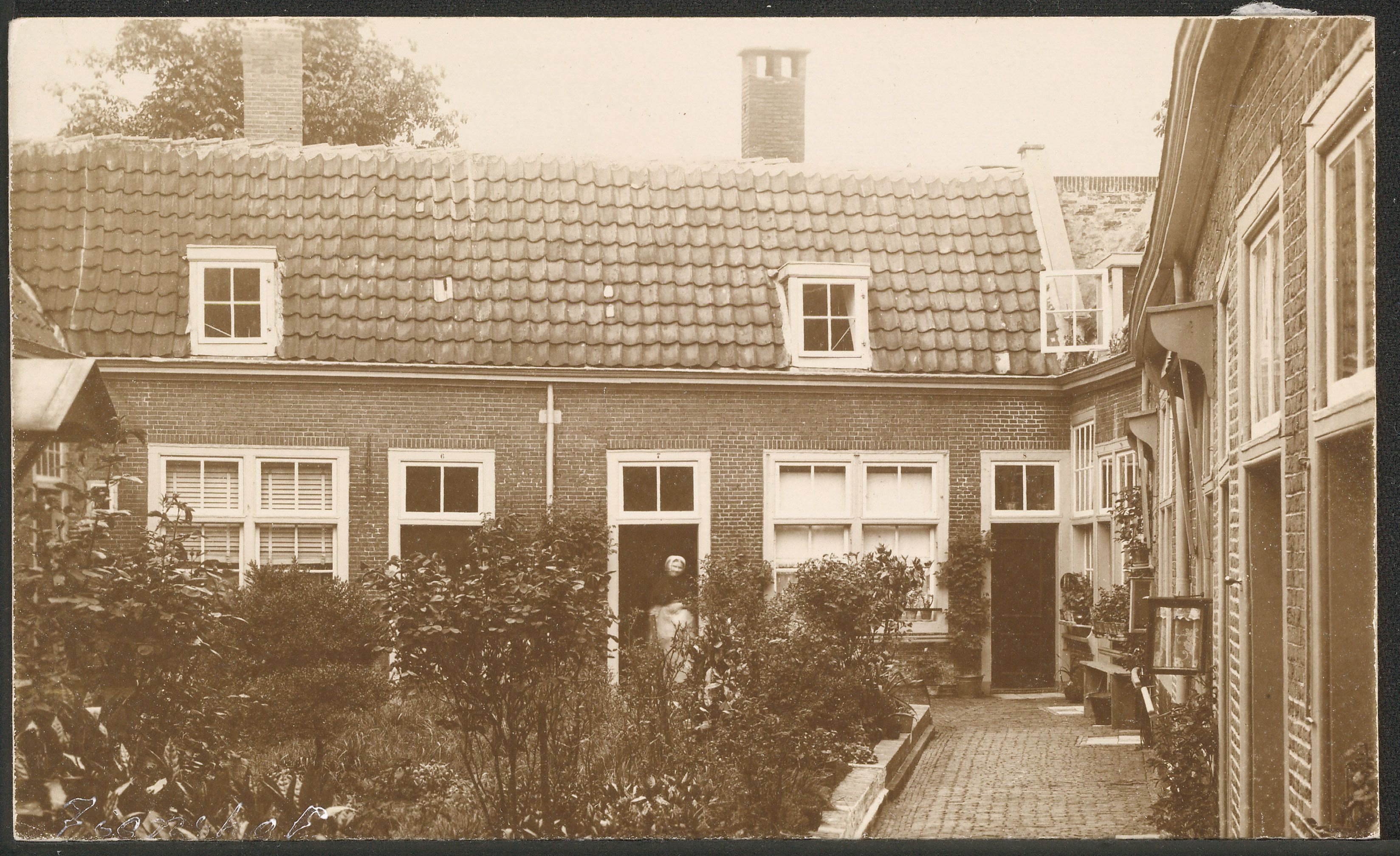 Binnenplaats van het Groot Sionhofje aan de Sionsteeg.